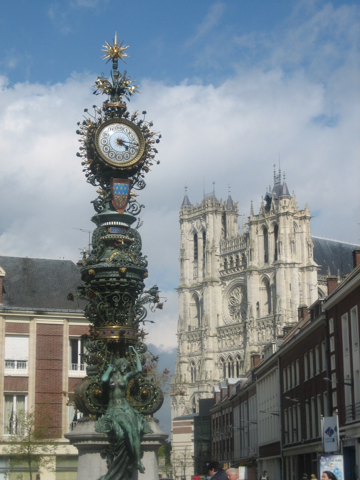 Amiens - am Hannergrond d'Kathedral.